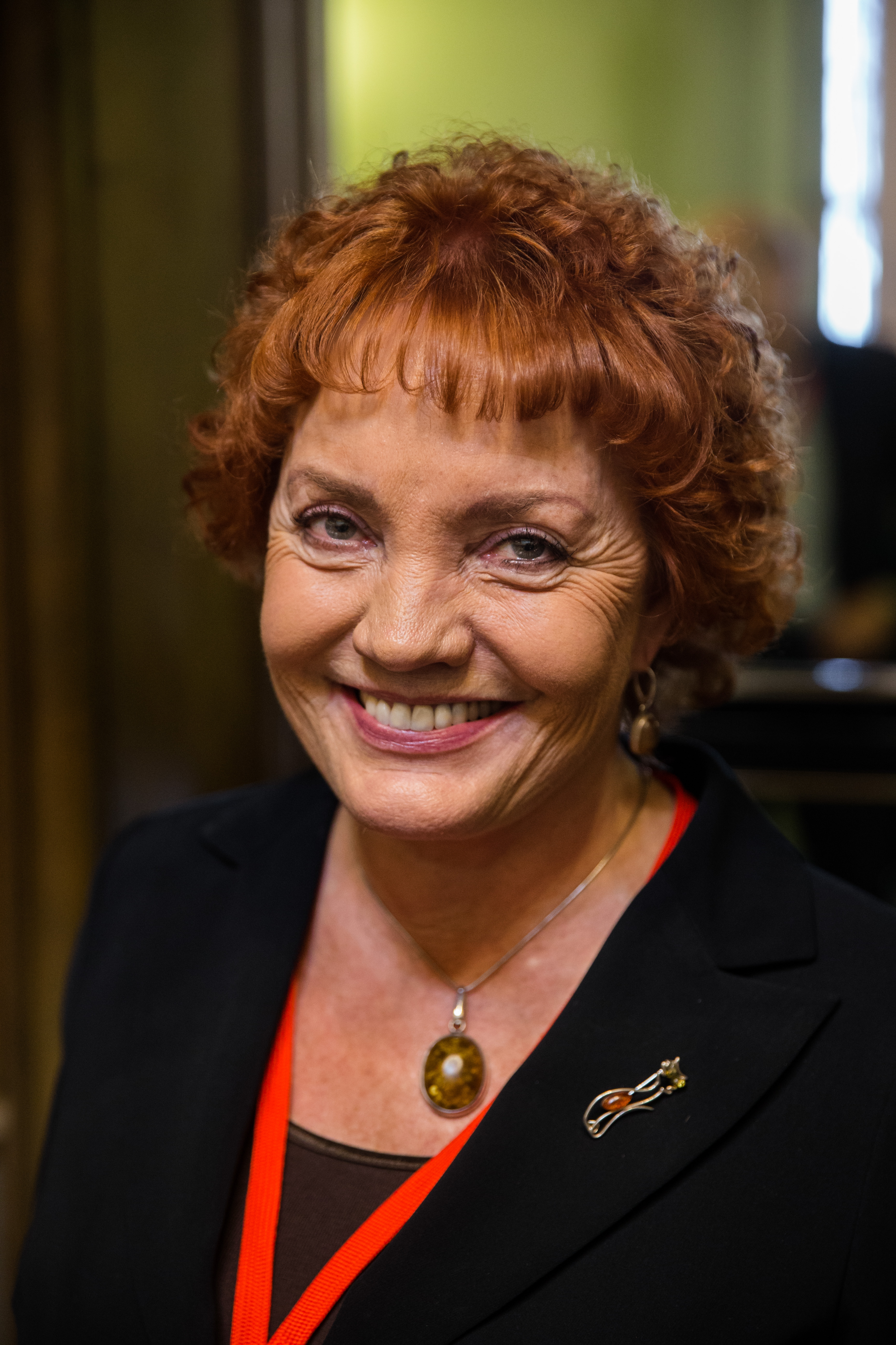 Nordiska rådets session i Helsingfors. Marit Nybakk (A)